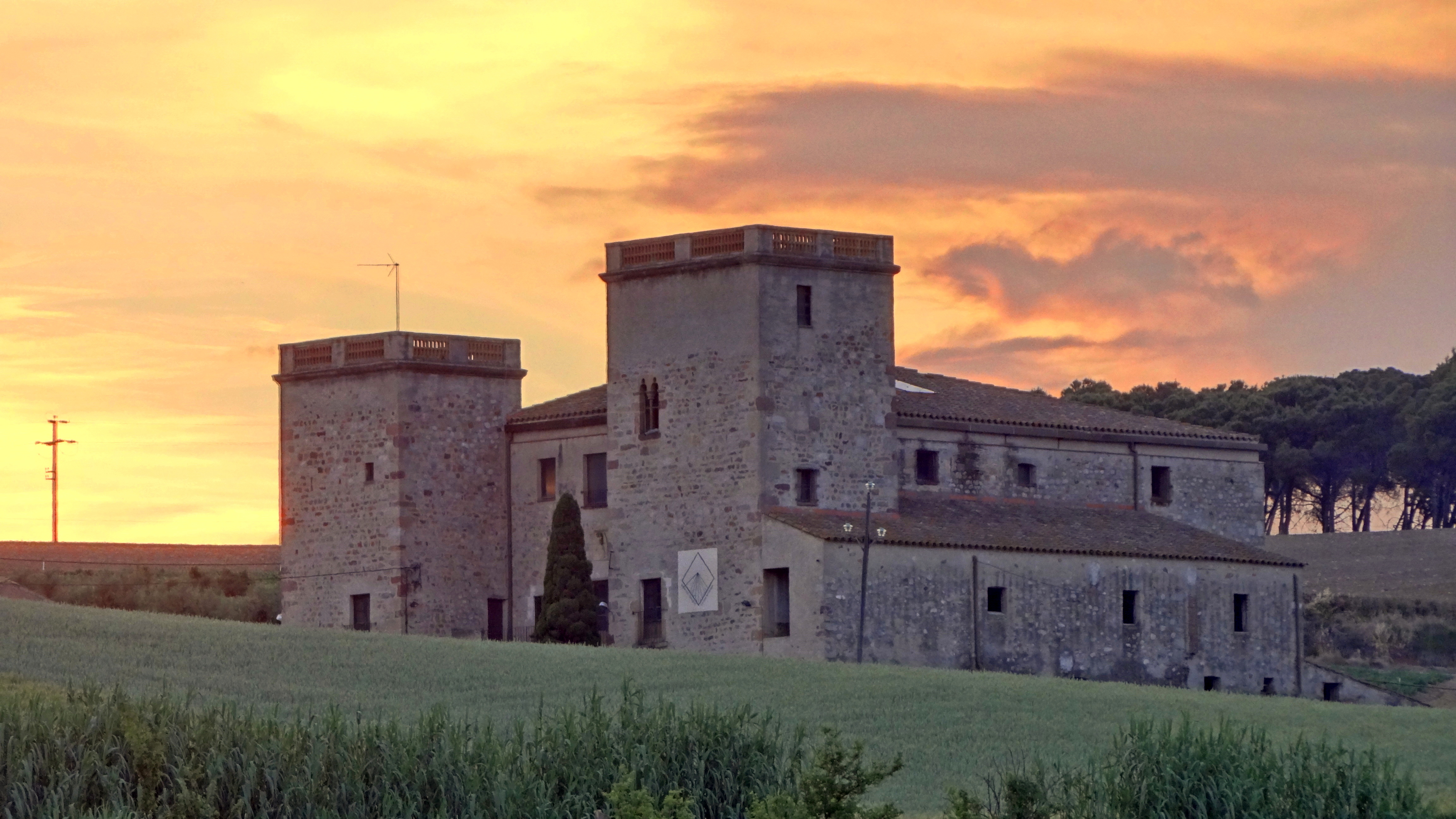 Torre d'en Malla (Gallecs, Parets del Vallès, Vallès Oriental).